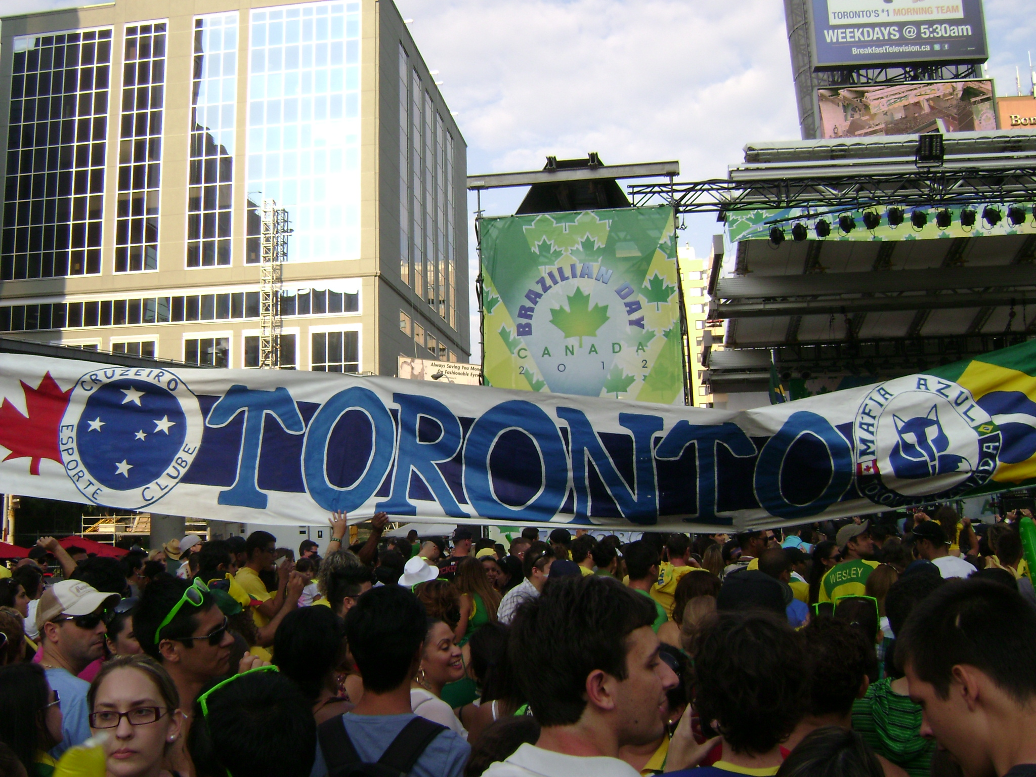 Faixa da Máfia Azul no Brazilian Day Canada 2012.